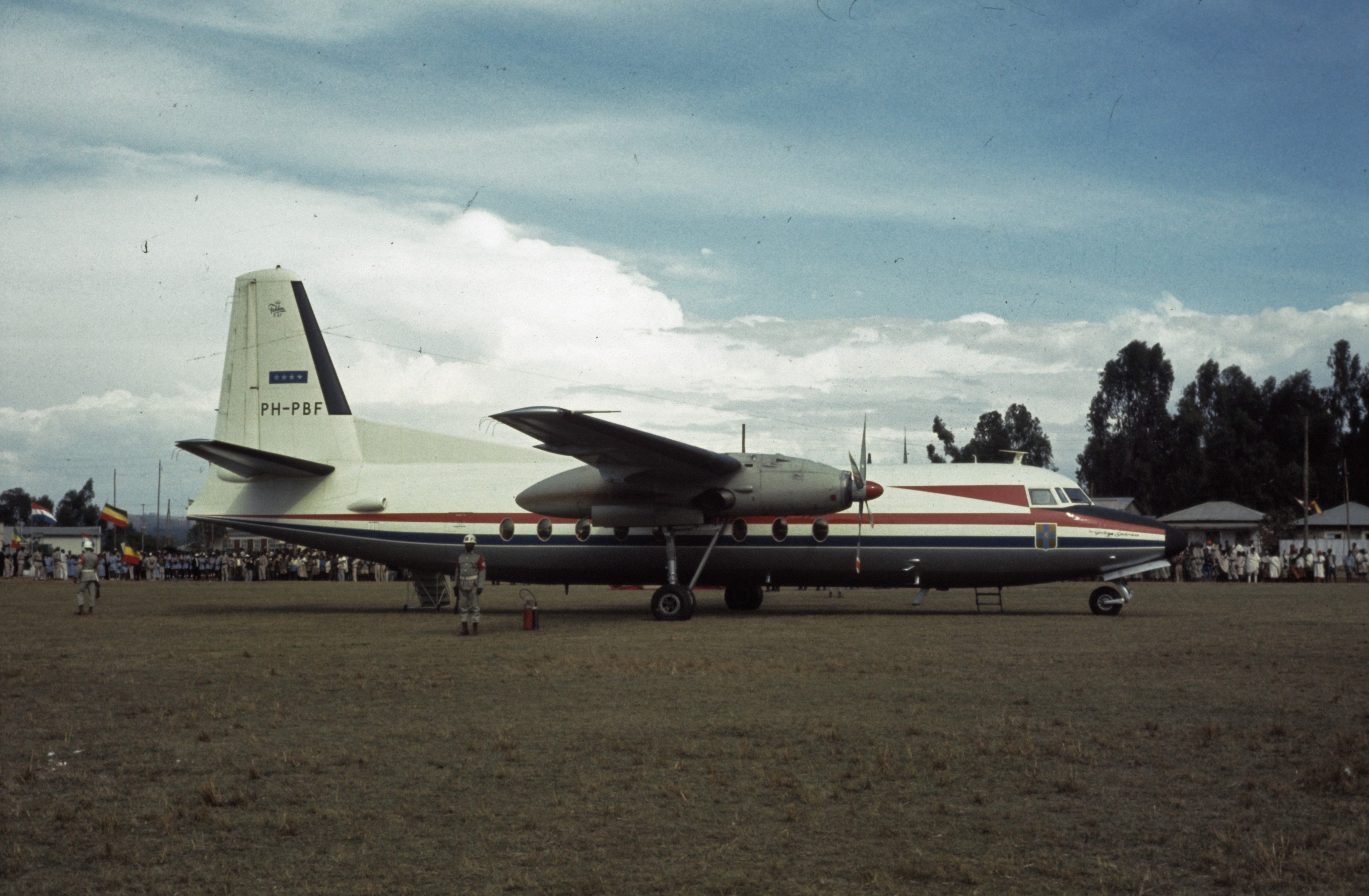 Collectie / Archief : Fotocollectie Anefo Reportage / Serie : [ onbekend ] Beschrijving : Bezoek Koningin Juliana , Pr. Bernhard , Pr. Beatrix Pr. Claus aan Ethiopie; bevolking en landschap Ethiopie Datum : 31 januari 1969 Locatie : Ethiopië Trefwoorden : BEVOLKING, bezoeken, landschappen, vliegtuigen Persoonsnaam : Bernhard, prins, Claus, prins, Juliana, koningin Fotograaf : Koch, Eric / Anefo Auteursrechthebbende : Nationaal Archief Materiaalsoort : Dia (kleur) Nummer archiefinventaris : bekijk toegang 2.24.01.06 Bestanddeelnummer : 254-8385